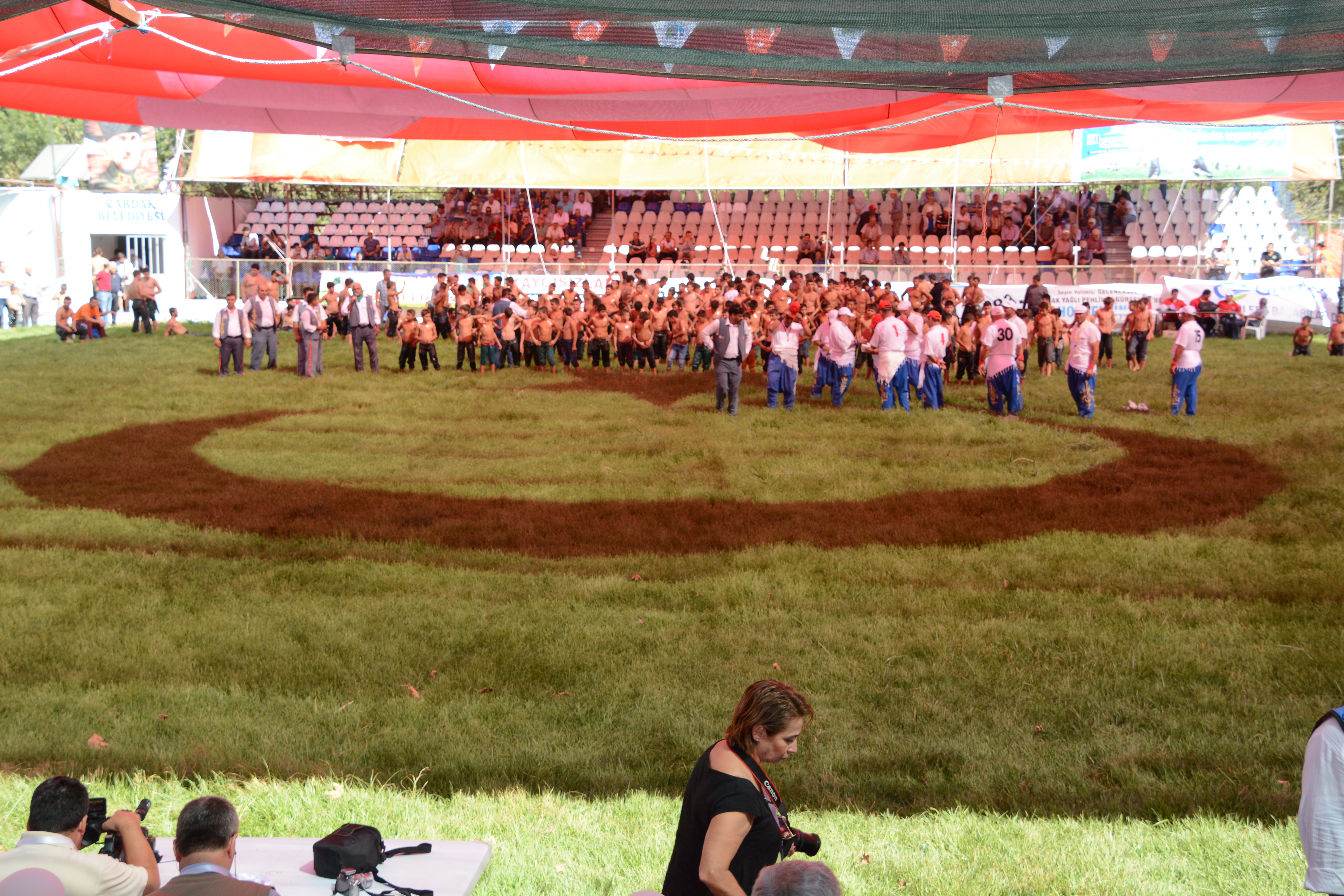 Geleneksel Çardak Yağlı Güreşleri